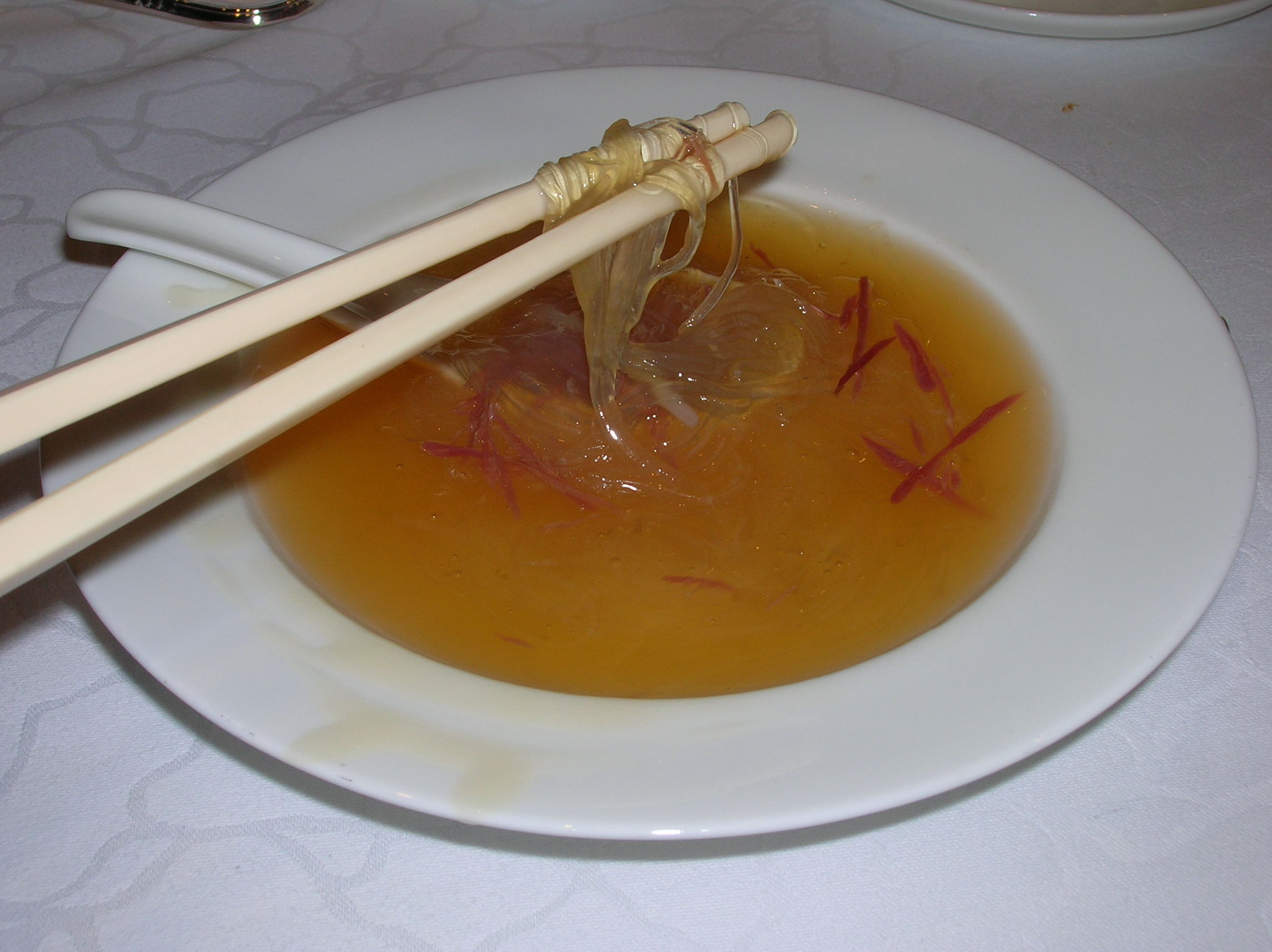 מרק קני ציפורים במסעדת פוק לאם מון